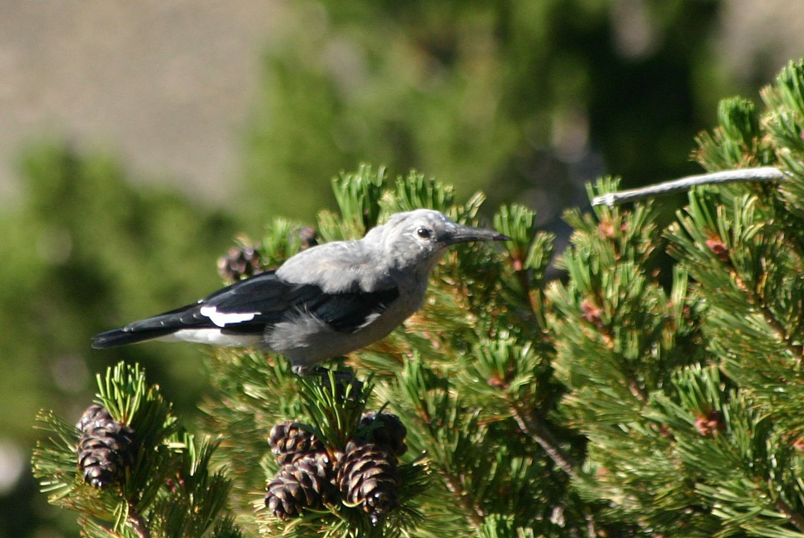 Nucifraga columbiana on Pinus albicaulis. Lassen Volcanic NP, Shasta Co., California.